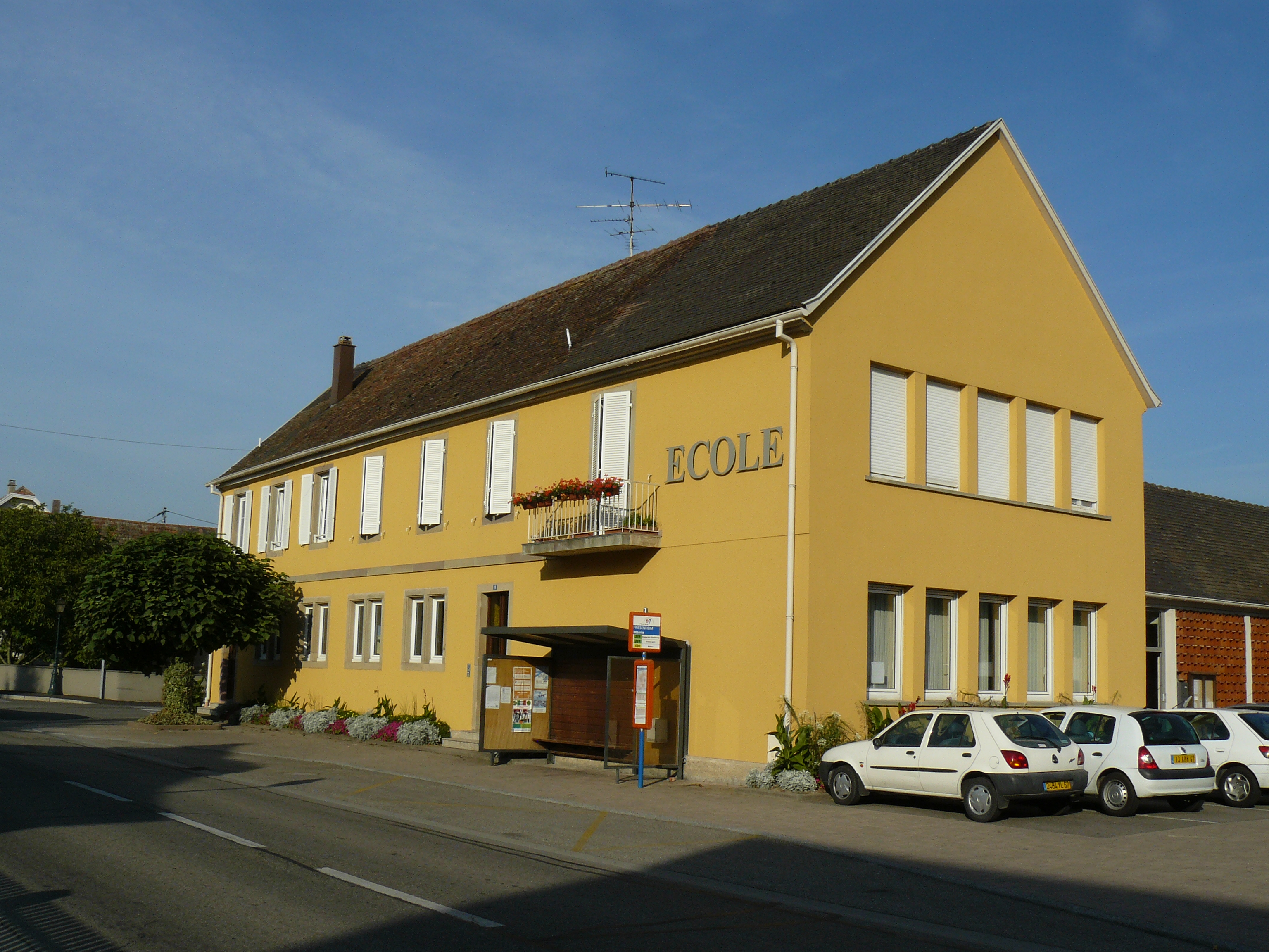 École primaire de Friesenheim